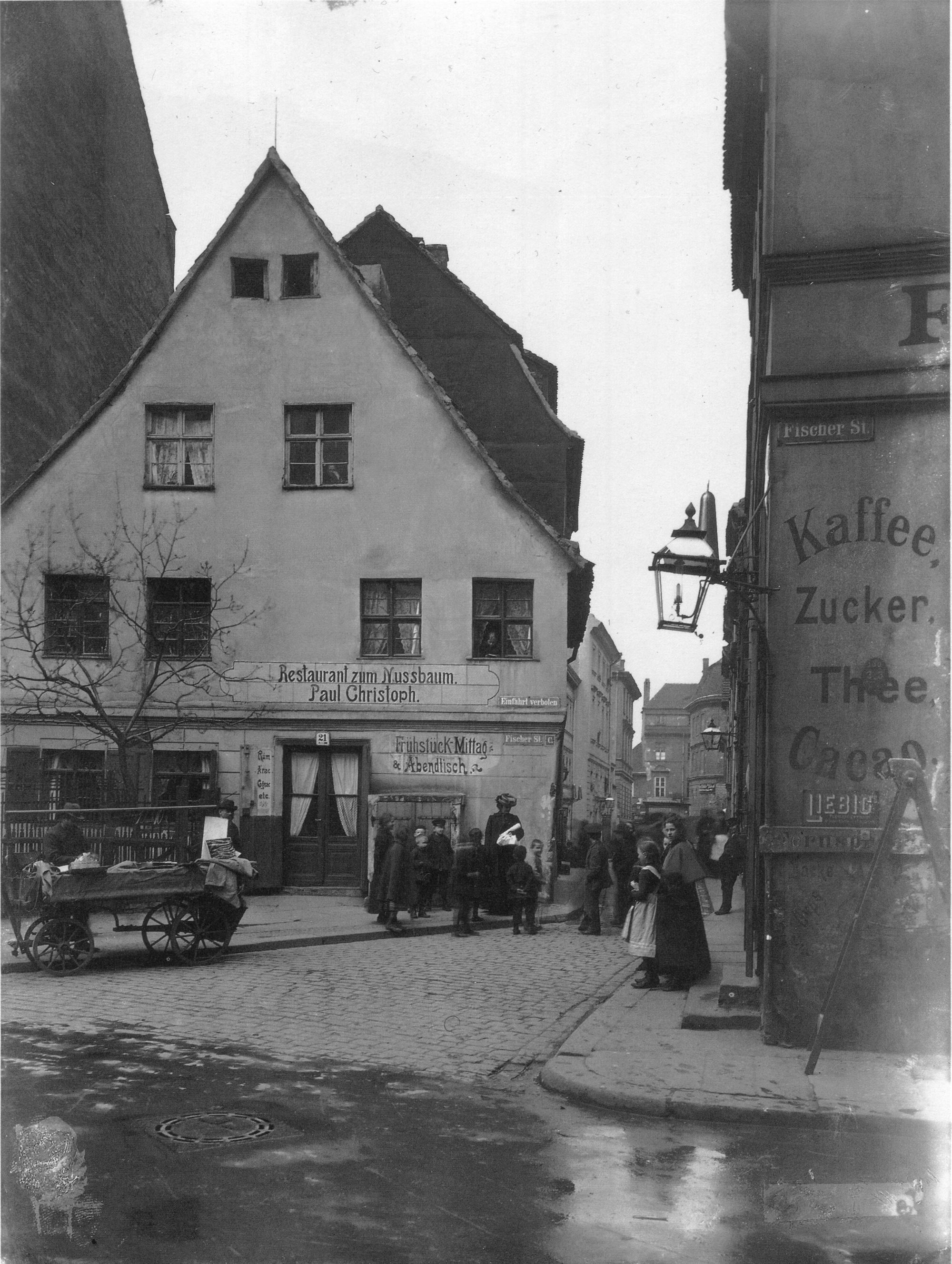 Berlin. Restaurant „Zum Nussbaum“ auf der Fischerinsel 1903. Nach dem Zweiten Weltkrieg wurde im Nikolaiviertel eine Replik dieses Gebäudes erbaut.